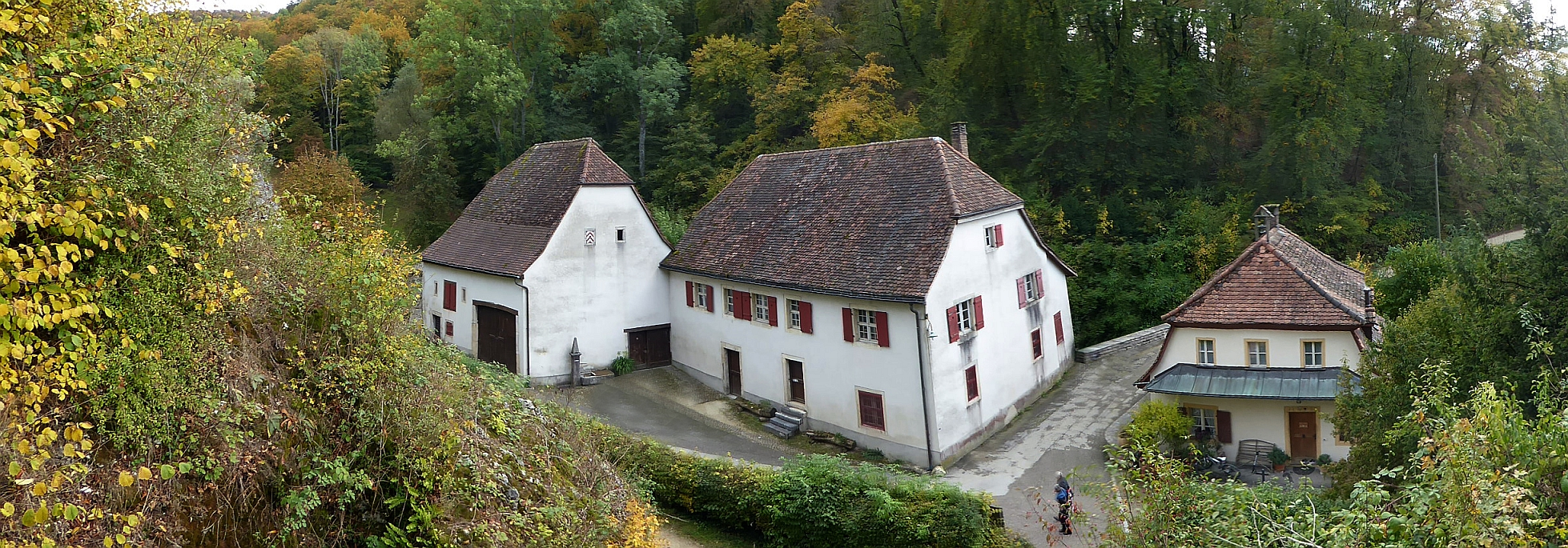 Ermitage Arlesheim,Mühle und Gärtnerhaus